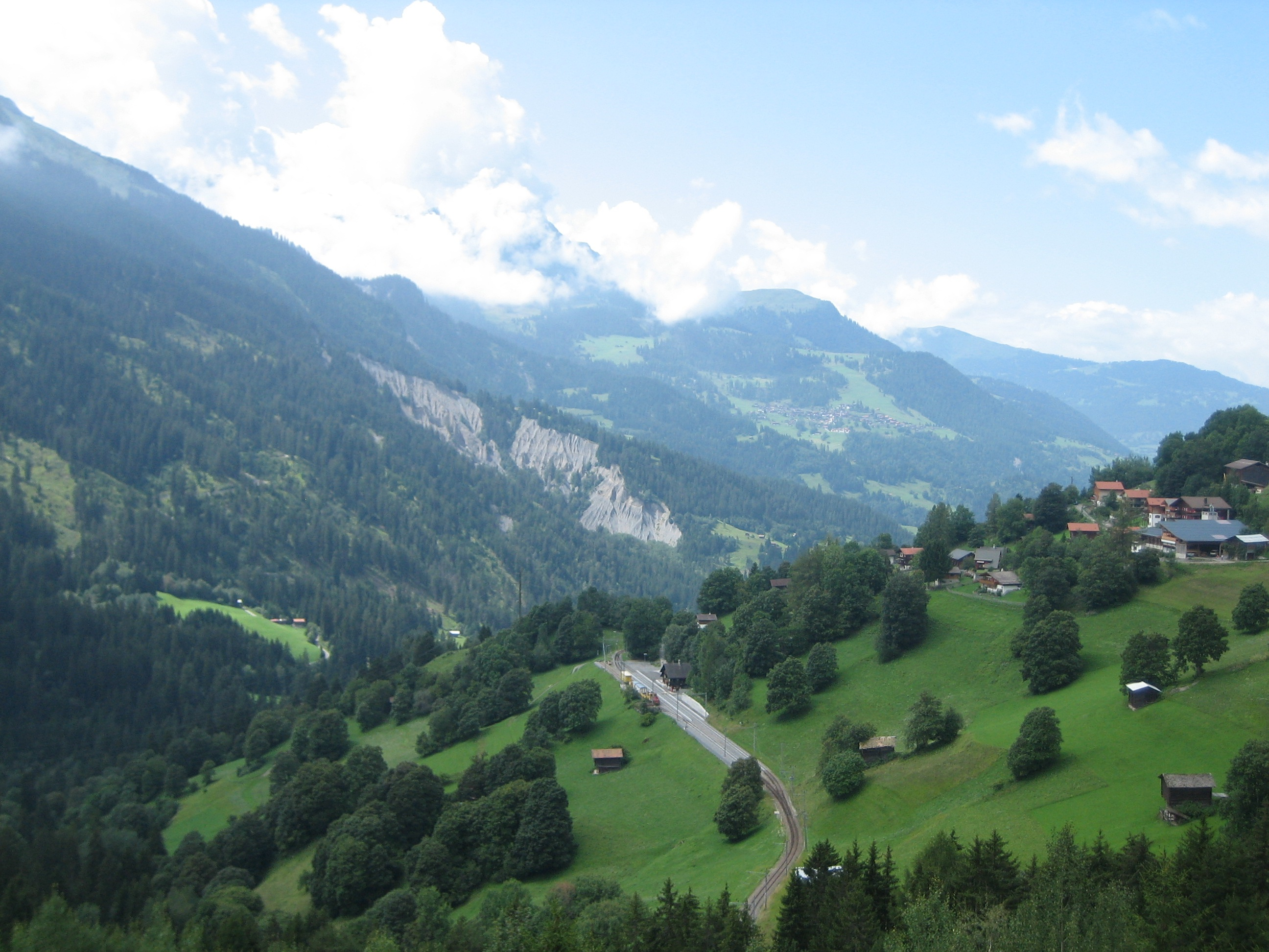 Schanfigg bei Peist